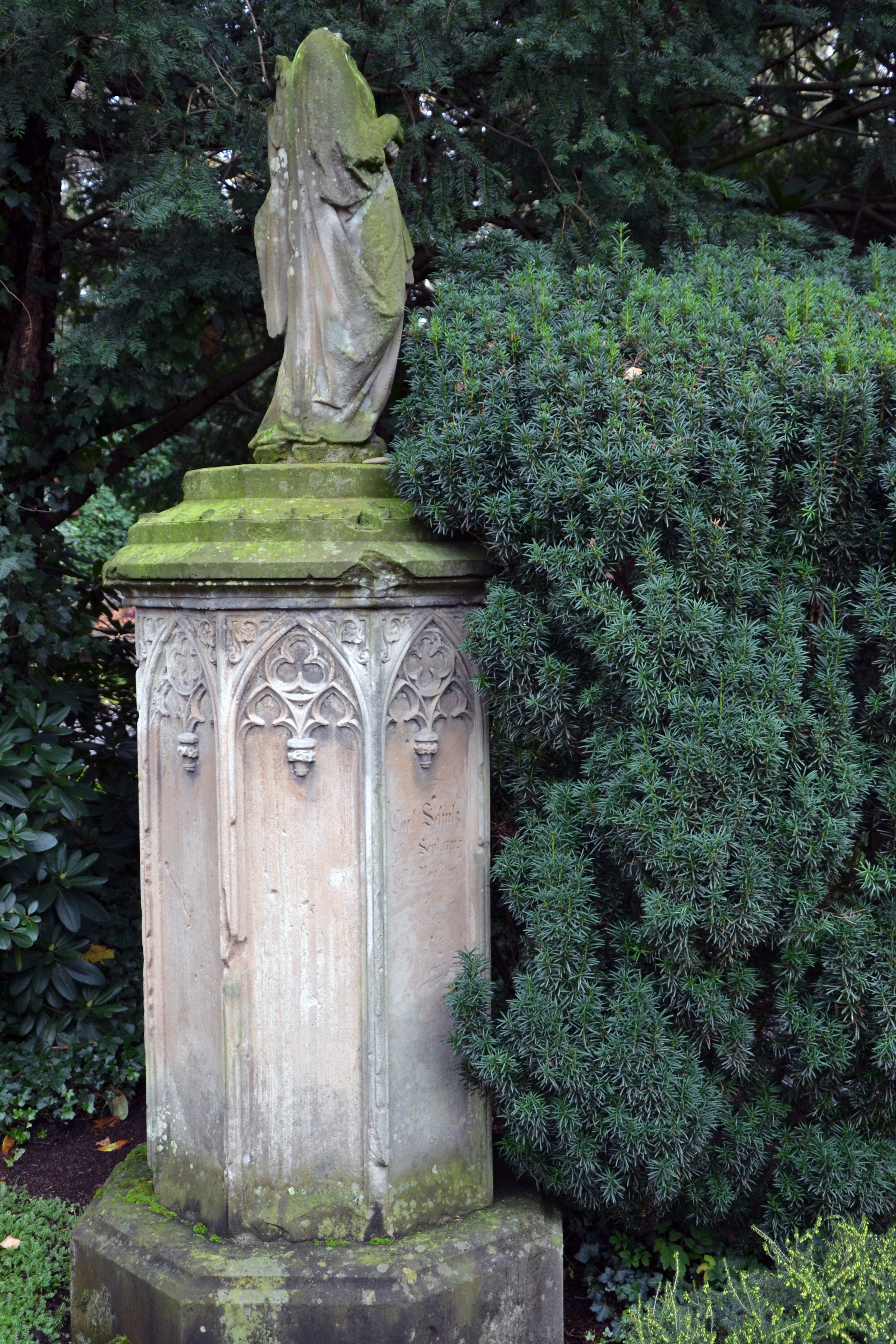 Essen, Ostfriedhof; Grabmal Carl Schulz, Mitbegründer der Firma Schulz-Knaudt